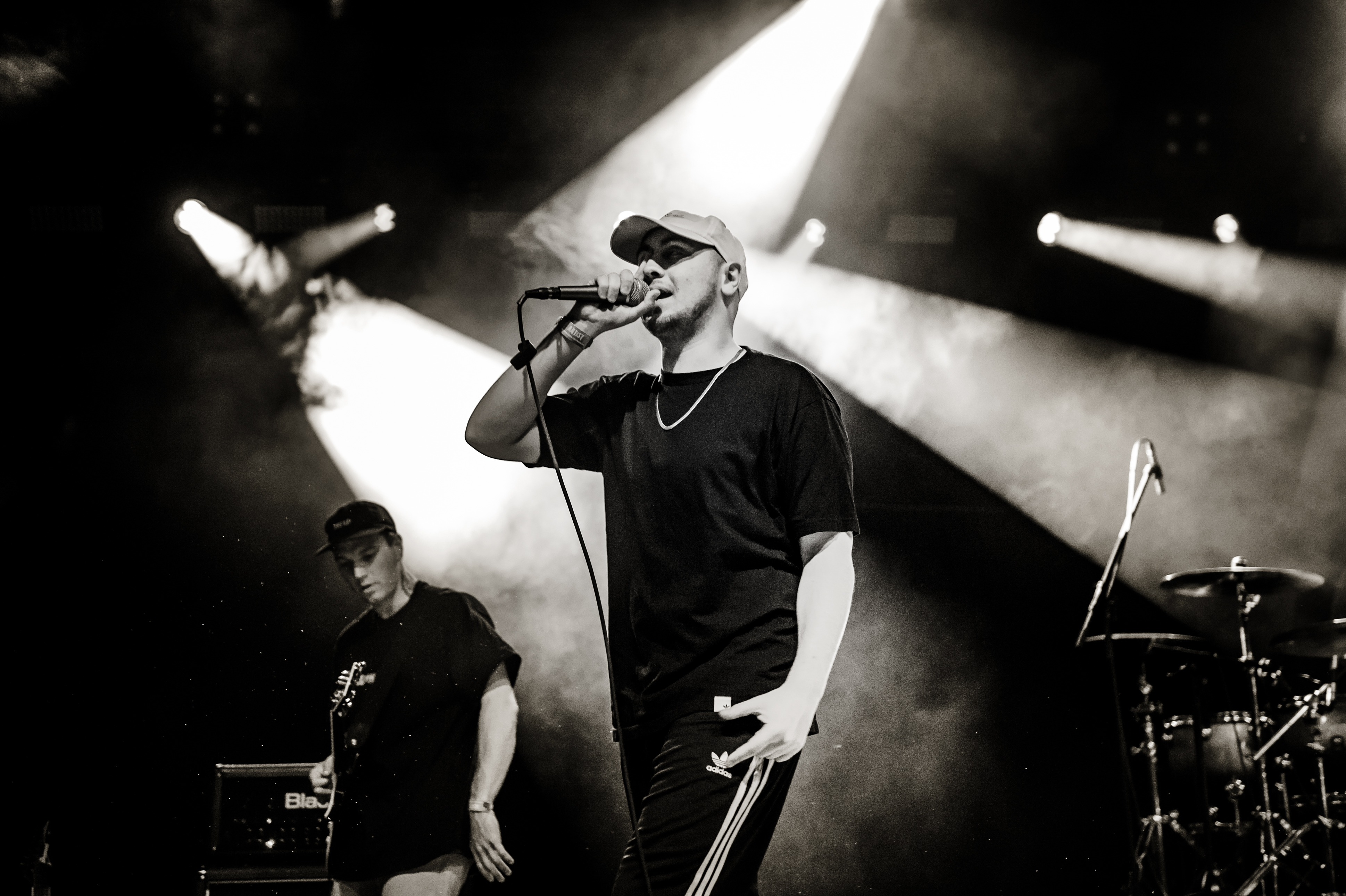 'Impericon Festival 2017; Oberhausen Turbinenhalle': 'Astroid Boys'